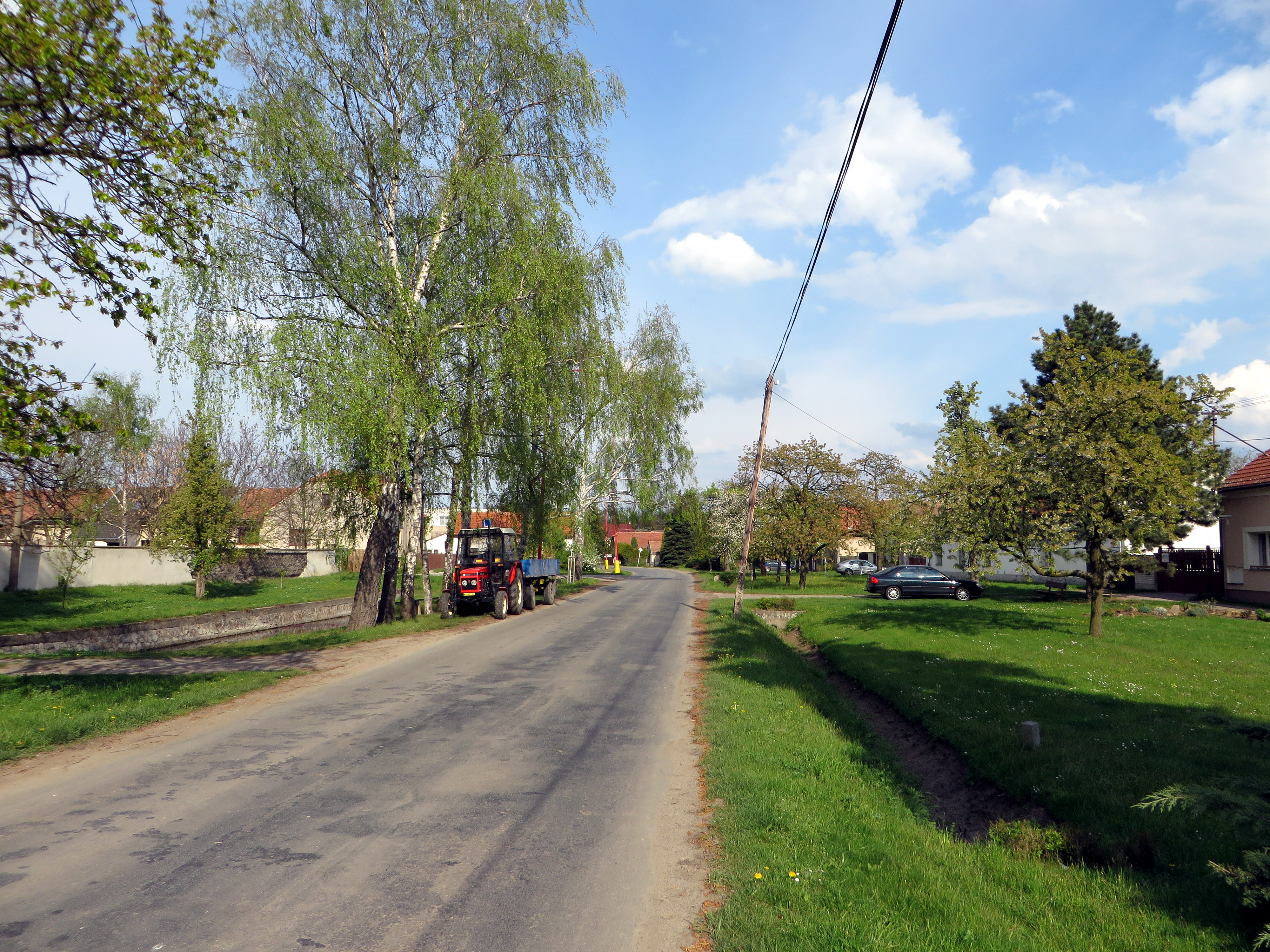 Přední Lhota